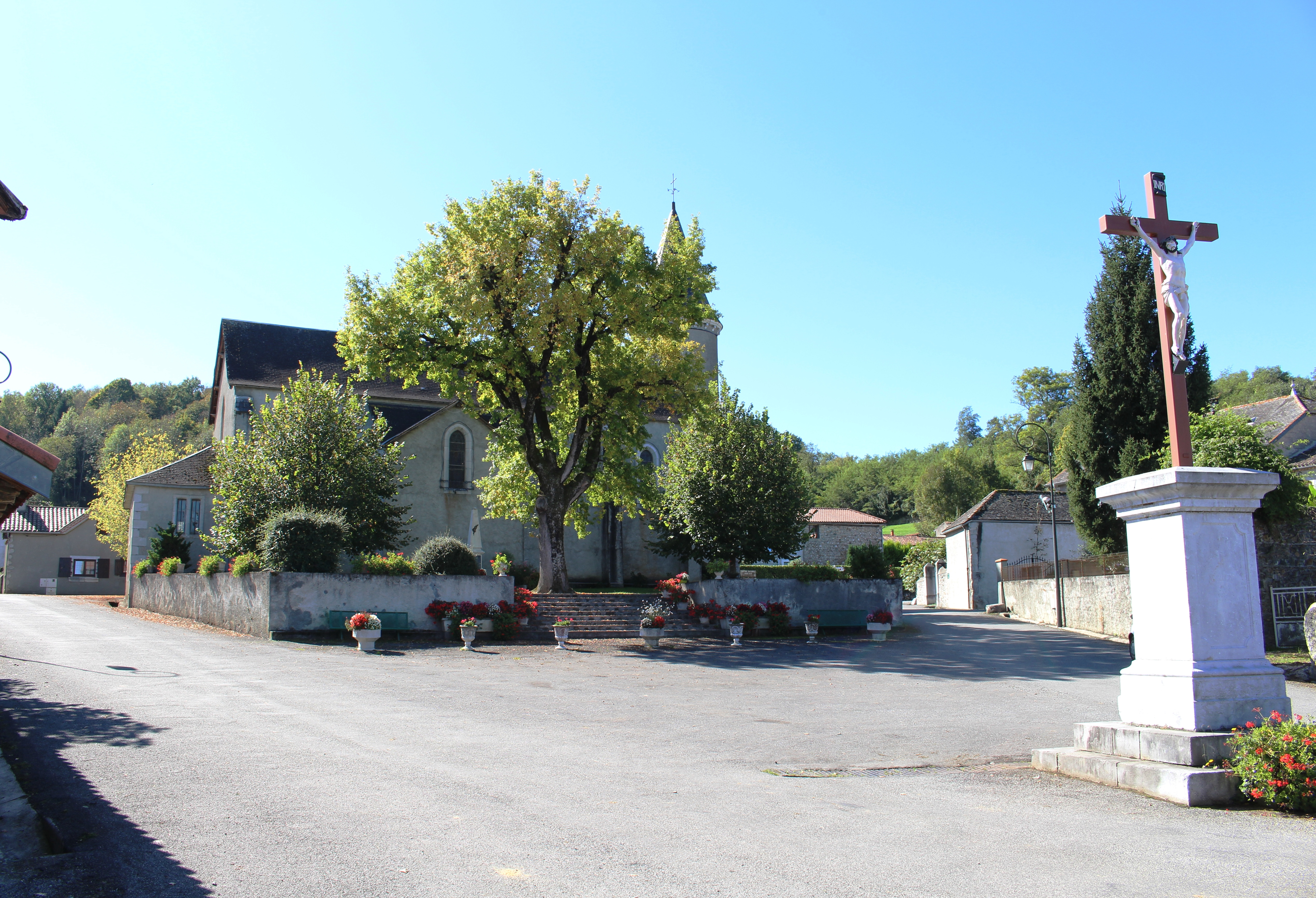 Montégut (Hautes-Pyrénées)